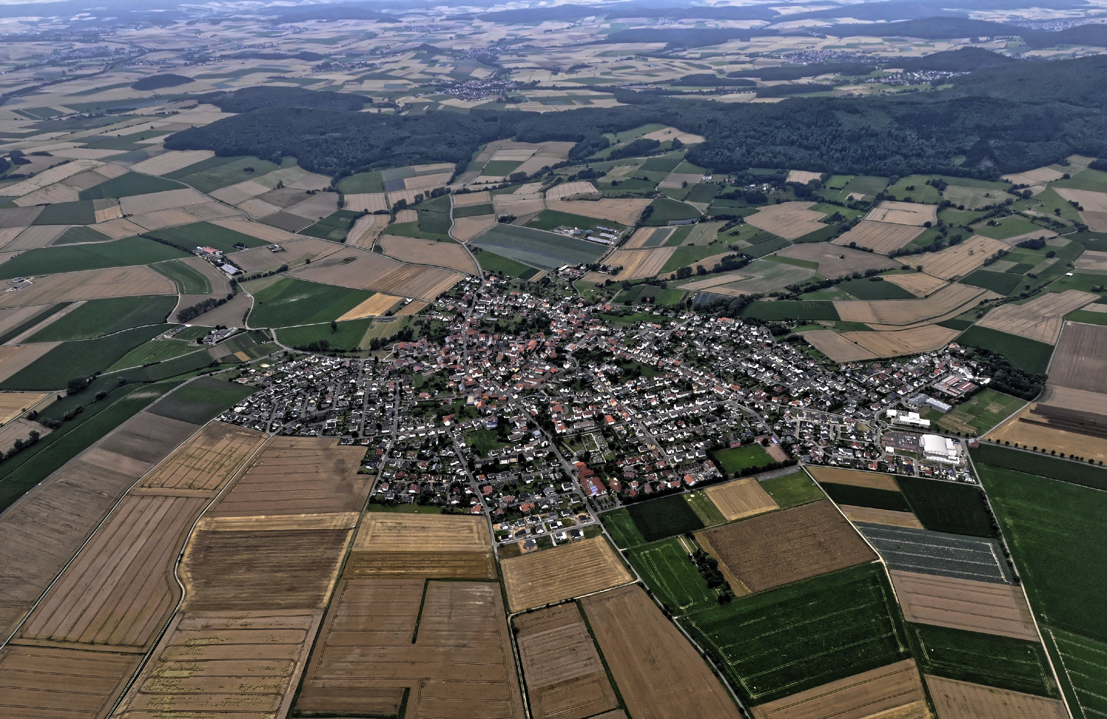 Bilder vom Flug Nordholz-Hammelburg 2015: Besse (Ortsteil von Edermünde), dahinter die bewaldeten Langenberge.